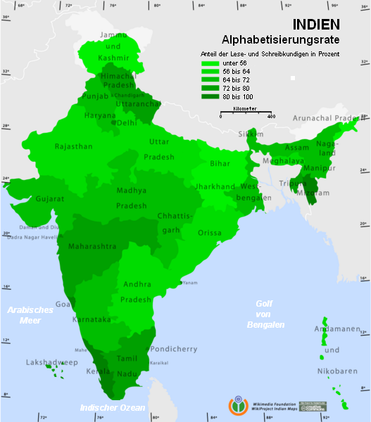 Karte: Anteil der Lese- und Schreibkundigen in indischen Bundesstaaten (deutsch) erstellt auf Grundlage von Image:Literacy rate map.png (englisch)